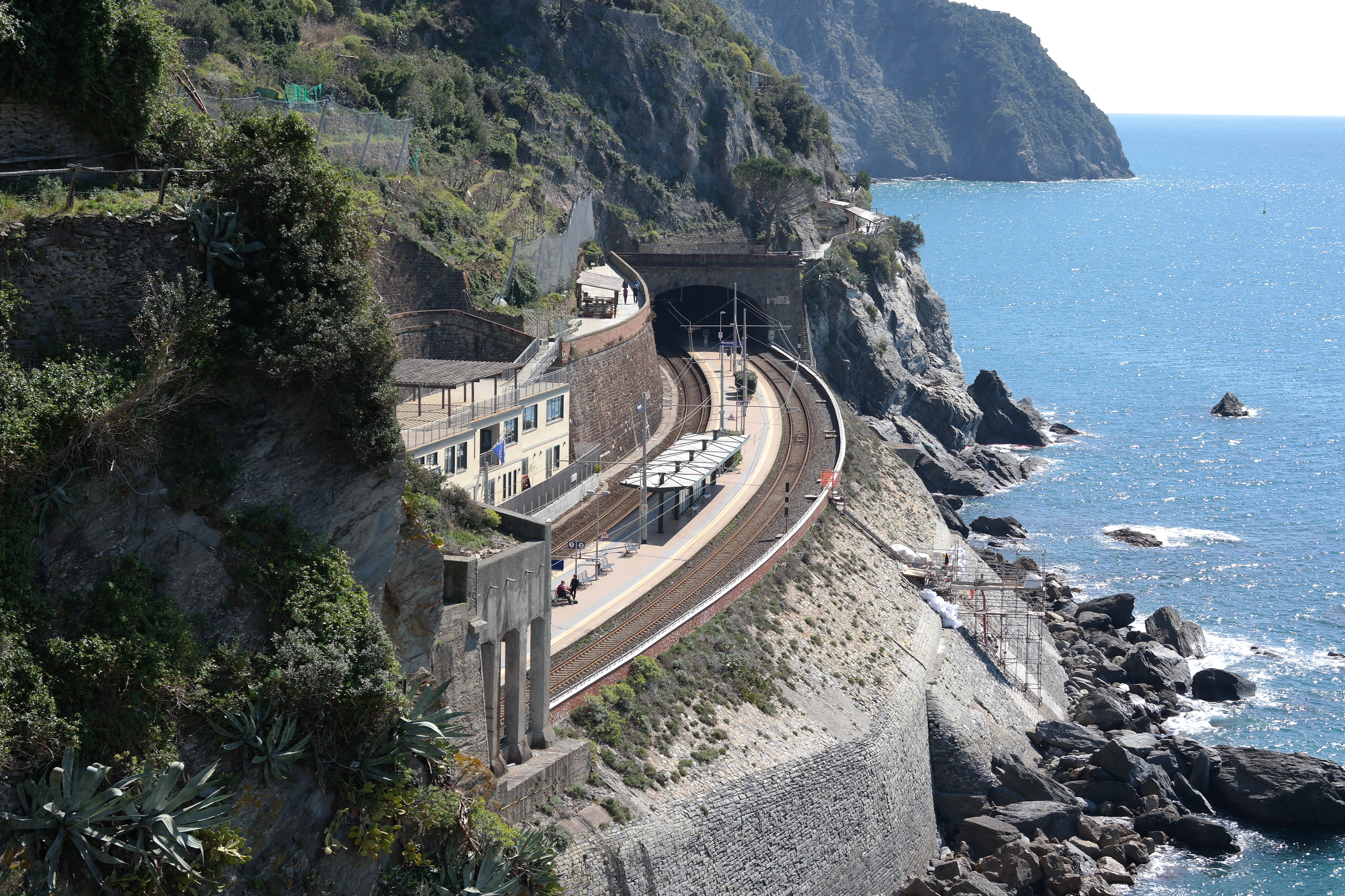 Stazione ferroviaria di Manarola